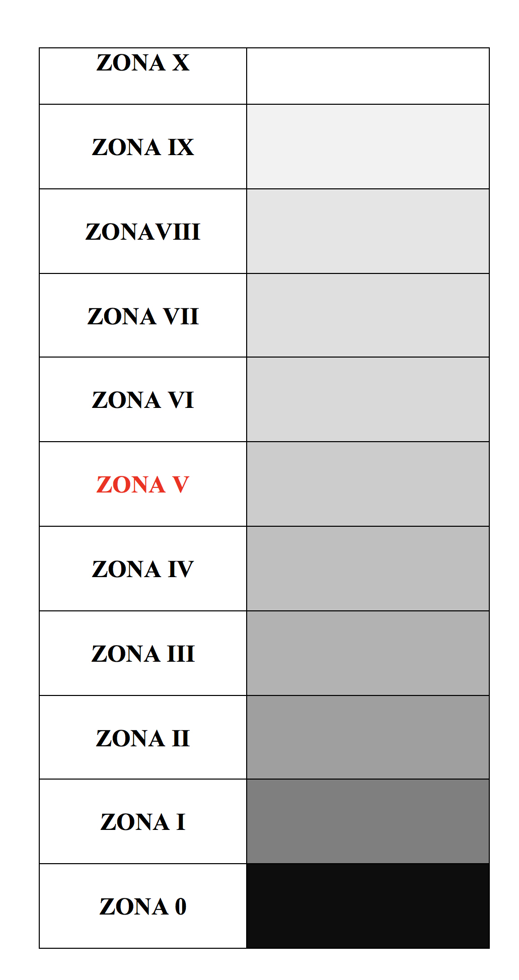 SISTEMA ZONALE